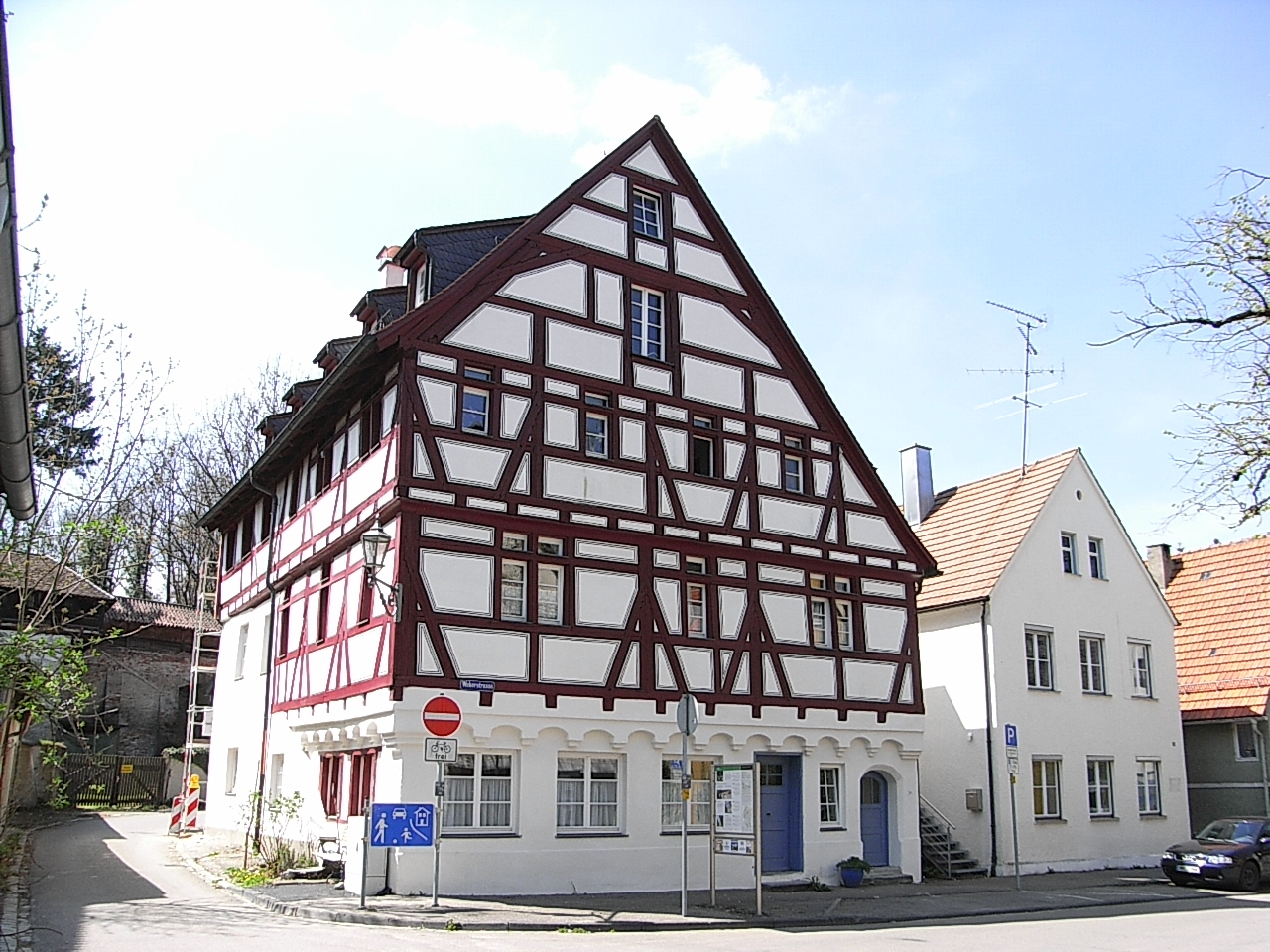 Memmingen, Das vorbildlich sanierte ehemalige Hurenhaus